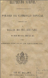 Parecer apresentado pela Comissão Especial no Senado